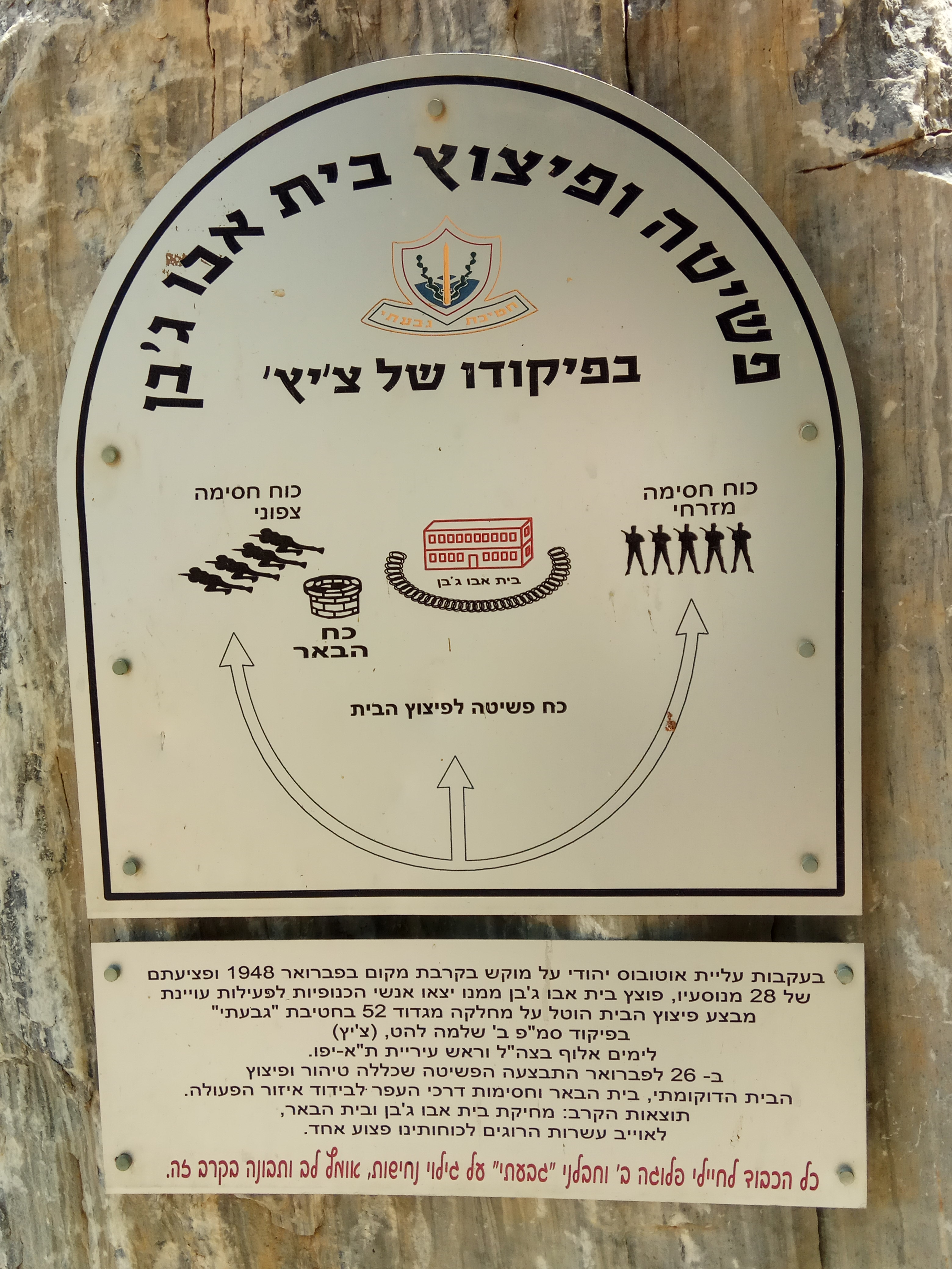 אנדרטת פיצוץ בית אבו ג'בן ליד צומת בית דגן